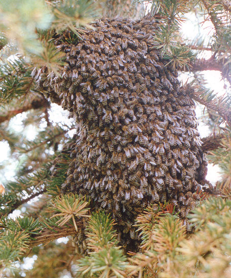 Kleiner Bienenschwarm' in Nadelbaum